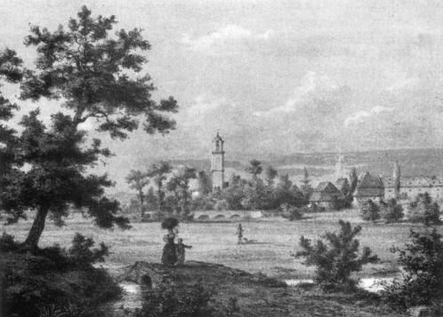 "Jakobskirche und Schönhof" in Frankfurt-Bockenheim; by Hans Völkers, ca. 1855